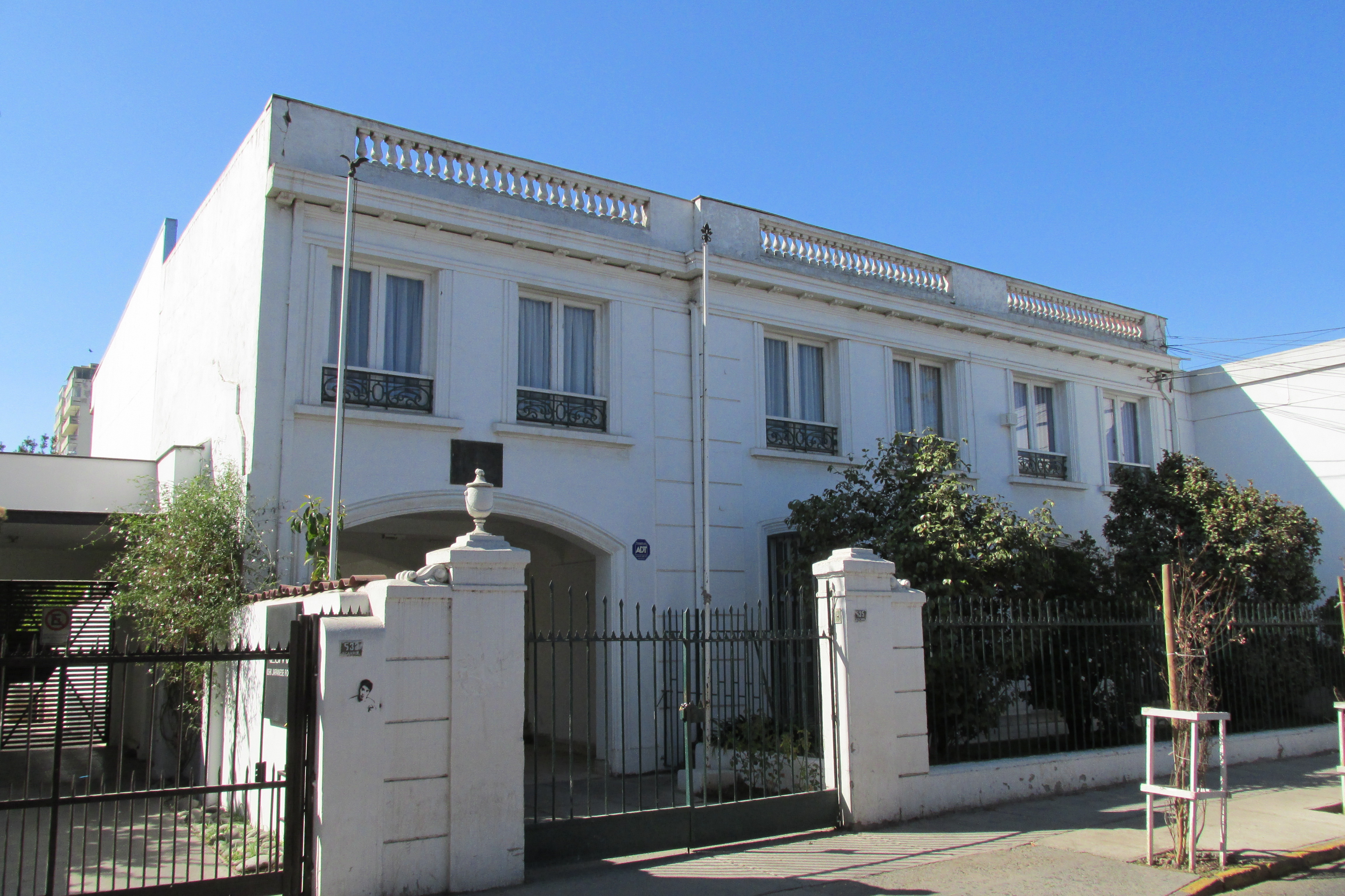 Obispado de Rancagua ubicado en calle O' Carrol 535 comuna de Rancagua